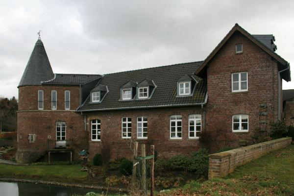 Denkmal Nr. 53 in Geilenkirchen-Honsdorf